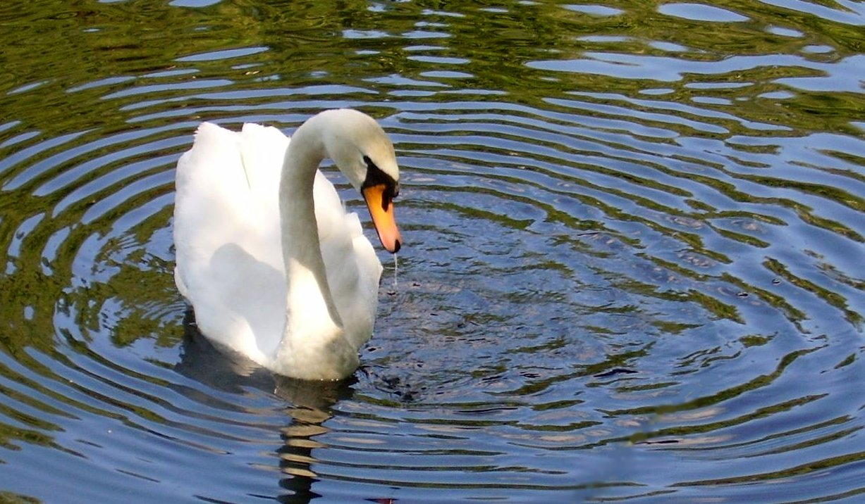 Łabędź niemy (Cygnus olor)